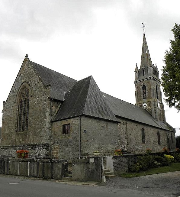 Église paroissiale Notre-Dame, à Notre-Dame-du-Touchet (50).